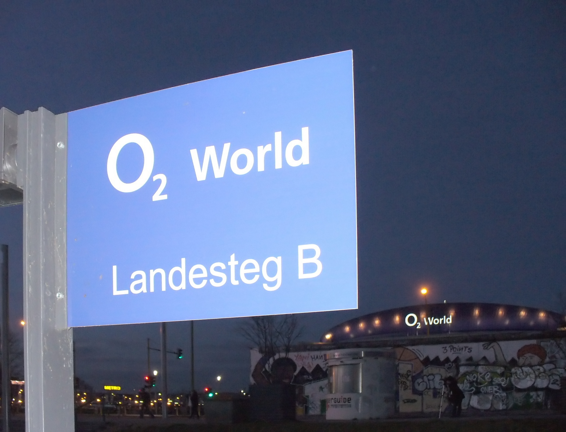 Schild der O2-World-Anlegestelle in der Dämmerung